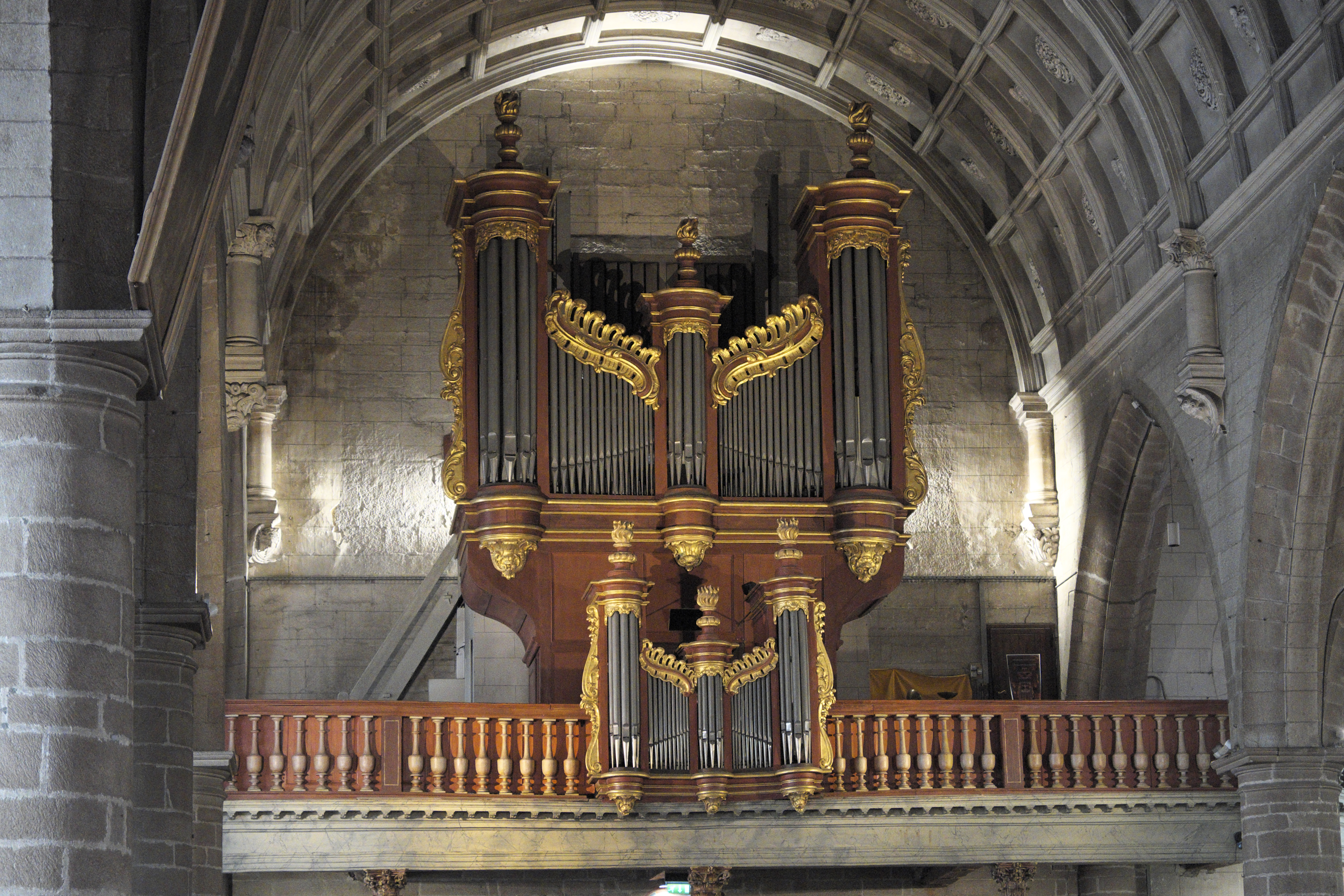 Katholische Pfarrkirche Saint-Gildas in Auray im Département Morbihan (Region Bretagne/Frankreich), Orgel